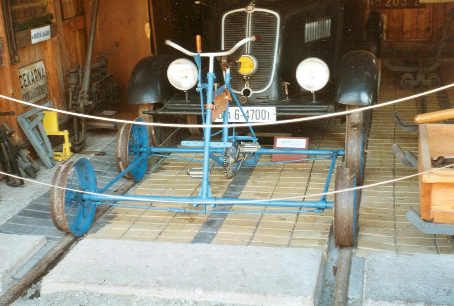 Das Eisenbahnmuseum Saubernitz ist bekannt für seine Draisinensammlung